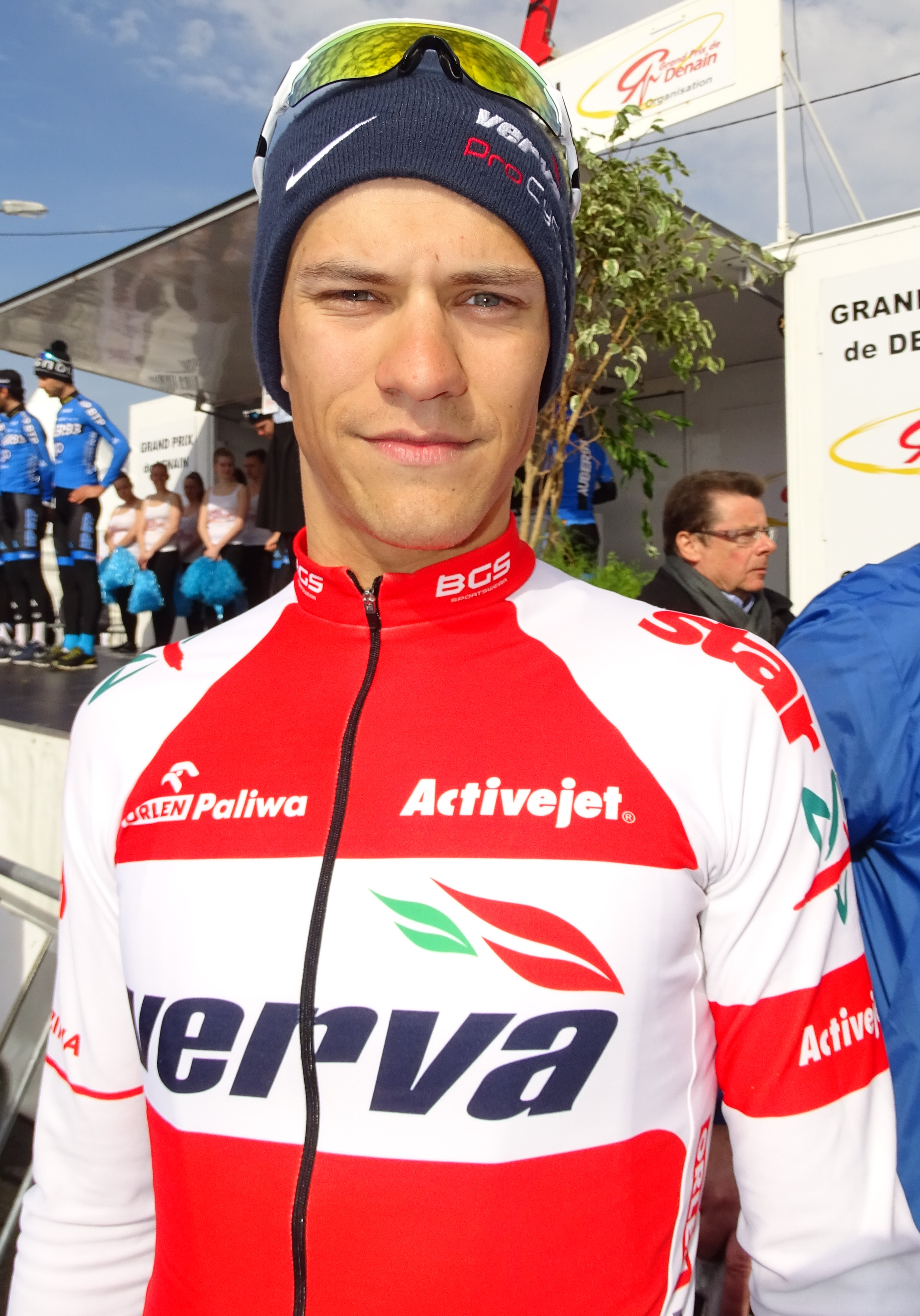 Reportage réalisé le jeudi 14 avril à l'occasion du départ et de l'arrivée du Grand Prix de Denain 2016 à Denain, Nord, Nord-Pas-de-Calais-Picardie, France.